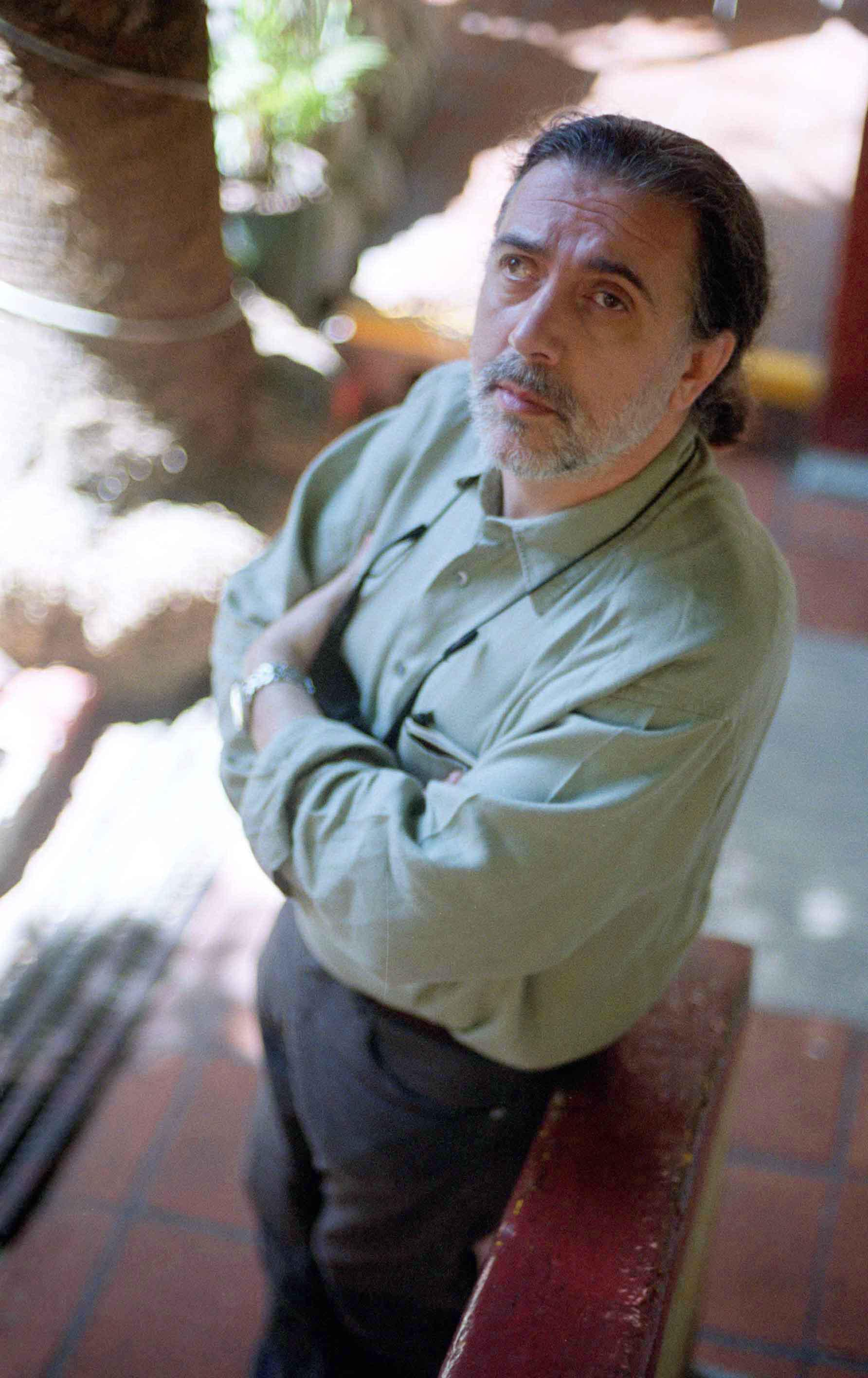 Folio 6654 nueva 010309 arte y gente fernando trueba cineasta espanol en entrevista en el marco de la muestra de cine mexicano. Foto ivan garcia guzman igg020